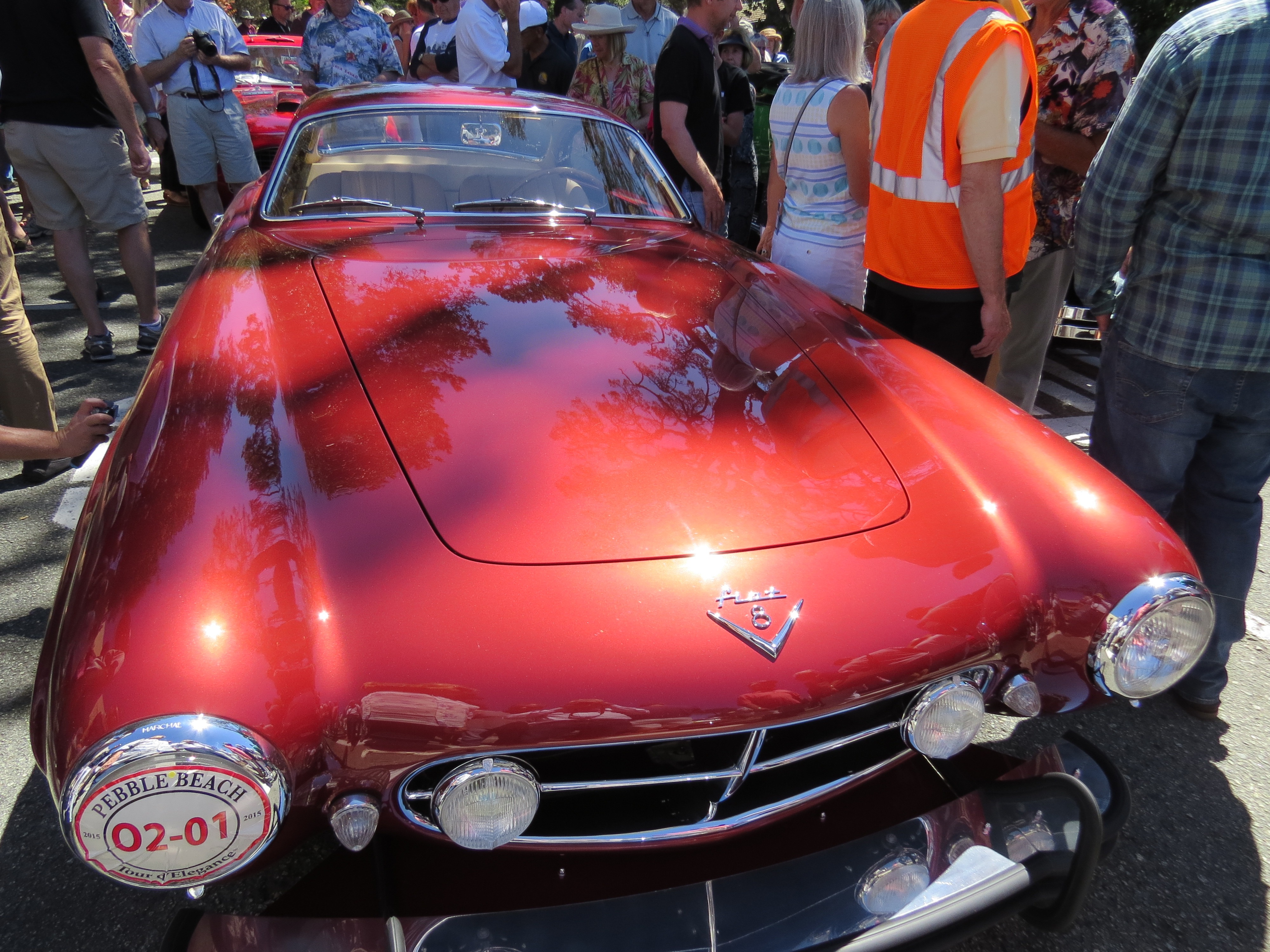 August 13, 2015